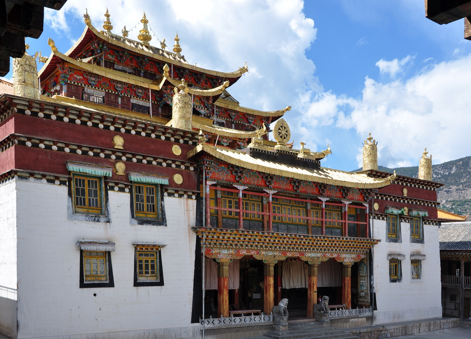 Dongzhulin Monastery